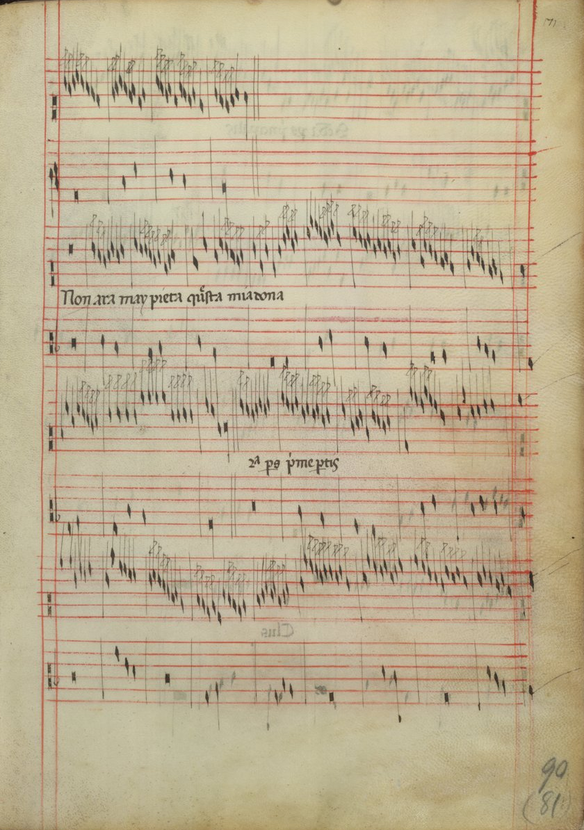 Intabulation Non ara may pieta questa mia dona de Francesco Landini — Codex Faenza, folio 80.